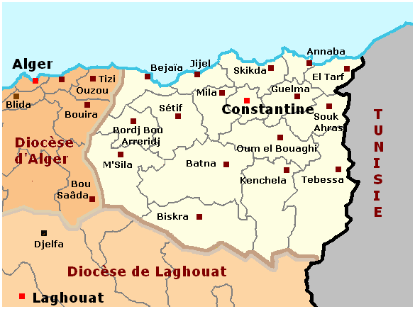 Localisation du diocèse catholique de Constantine, Algérie.